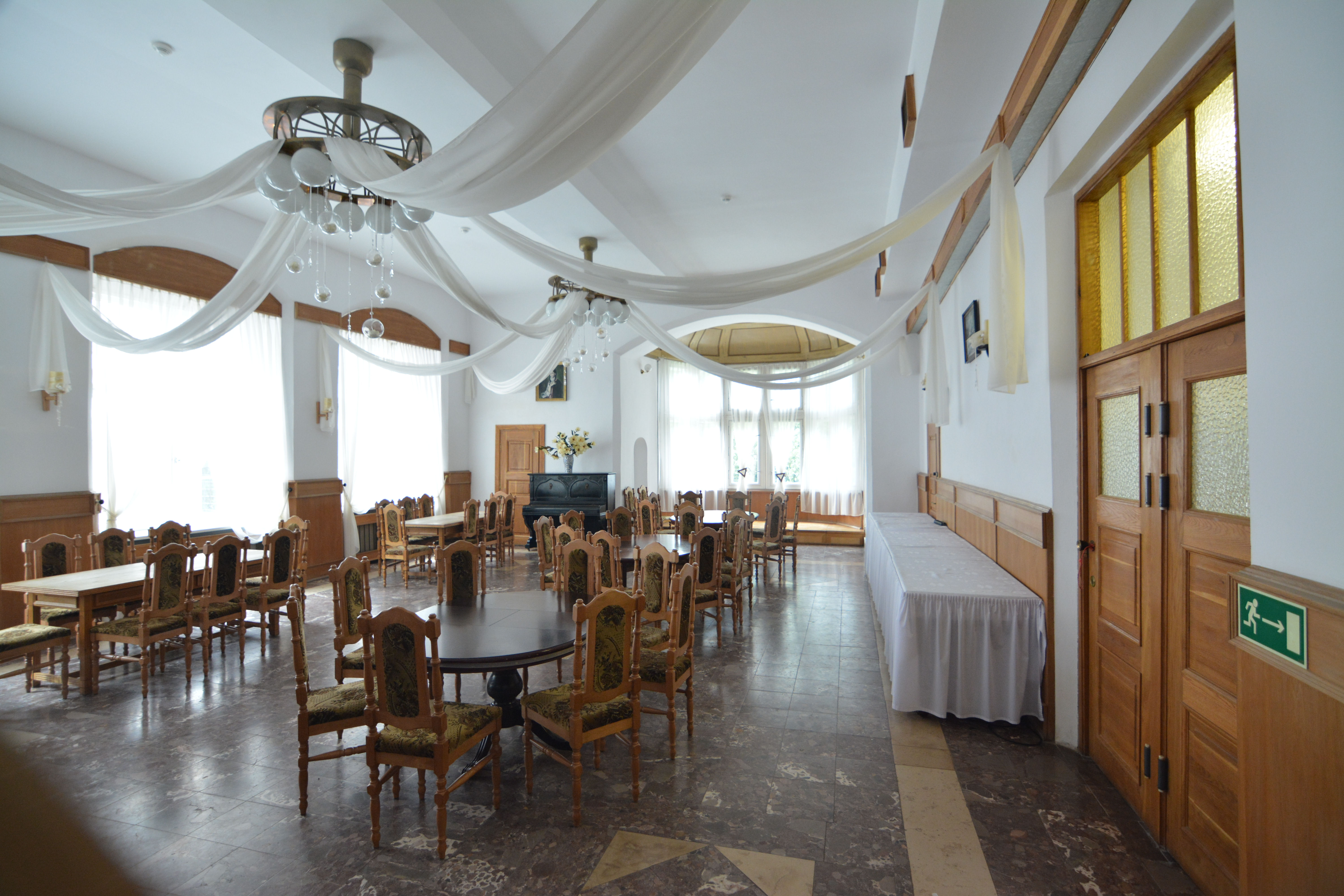 Pęzino - zamek, XIV, 1 poł. XVI, 1600, XIX